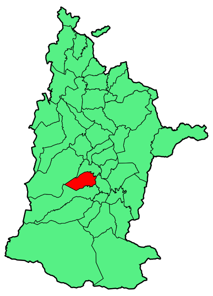 Aipaturiko udalerriaren kokapena Zuberoan